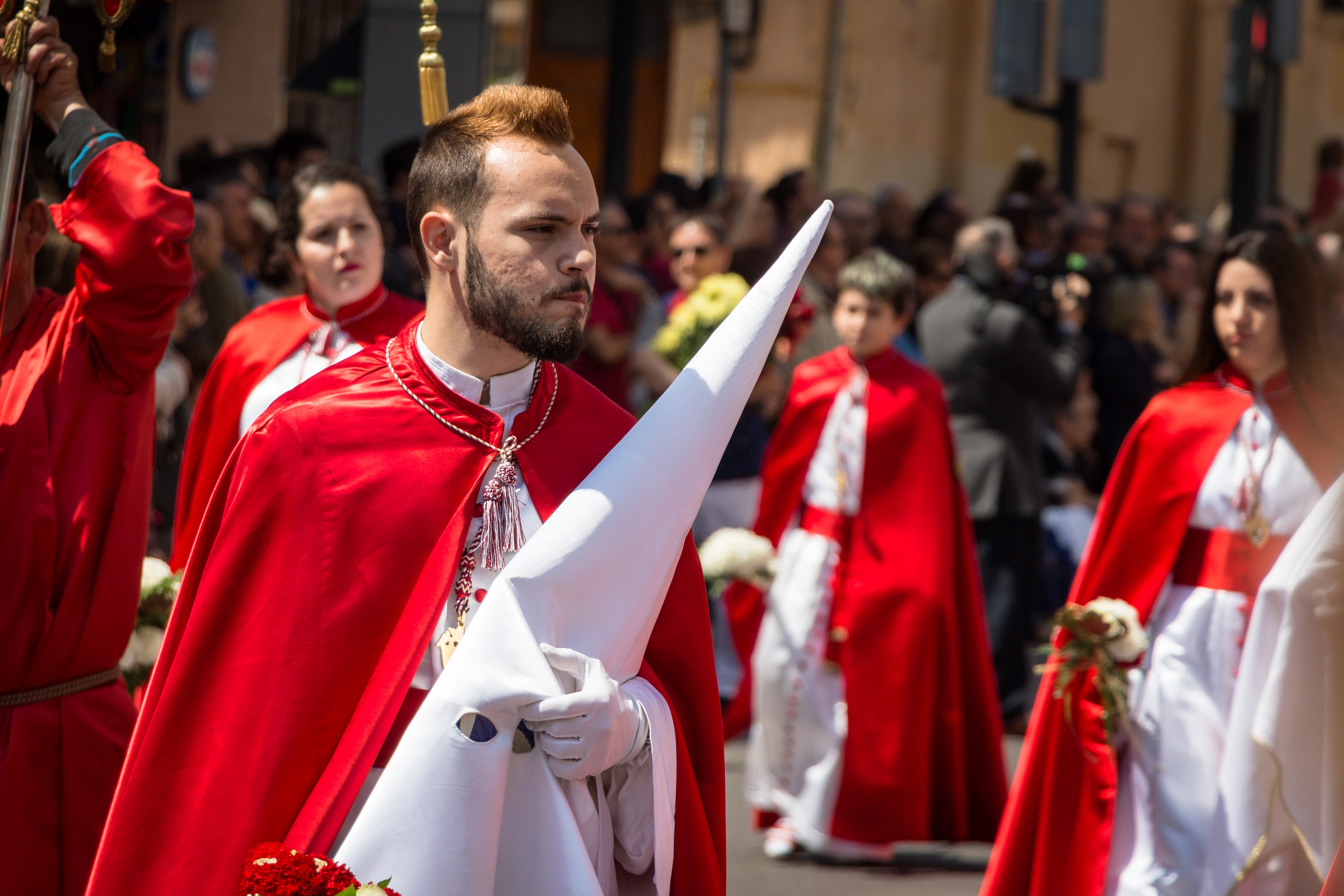 El Desfile de Resurrección es un acto único entre las celebraciones de Semana Santa, pues lo domina la alegría y el colorido. Los penitentes visten hábitos más claros y caminan con la cabeza descubierta. This is a photography of a Folklore festival in Spain (Wikidata id Q9075846).